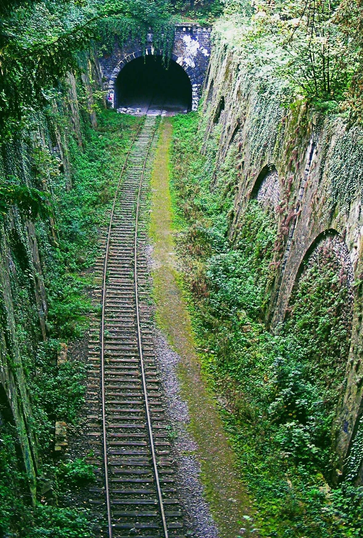 Tranchée de la ligne de Petite Ceinture de Paris au Parc de Montsouris en direction de l'ouest vers l'entrée du tunnel.